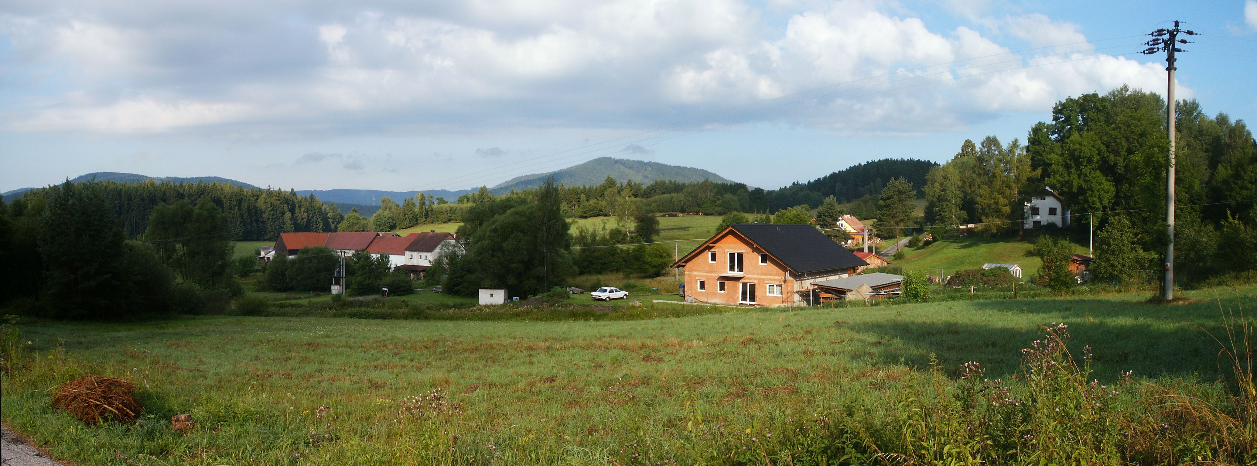 Lachovice - celkový pohled od východu